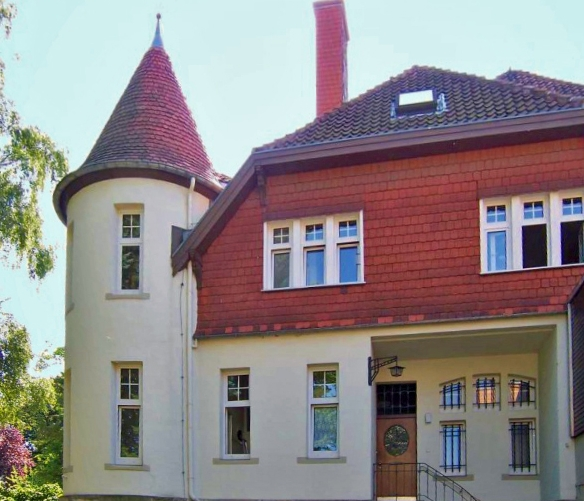 Stürzende Linien beseitigt